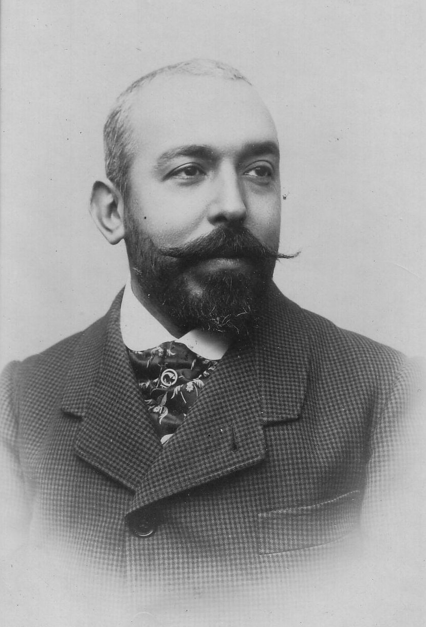 Retrato de Eusebio Bosch i Humet, de la década de 1890-1900. Hecha en Sabadell.